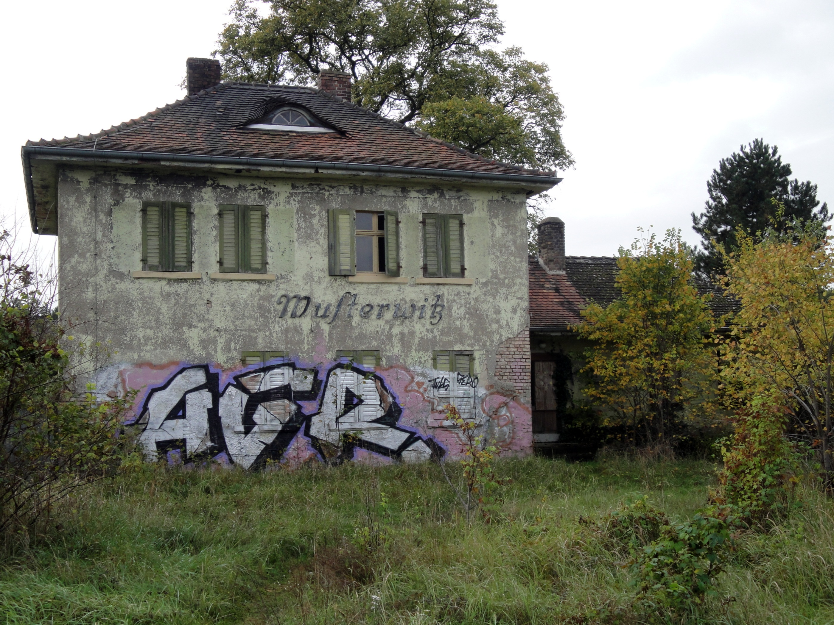 Kleinbahnbahnhof Wusterwitz